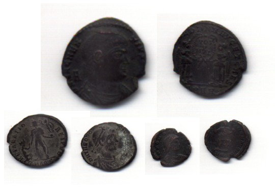 Algunas de las monedas romanas